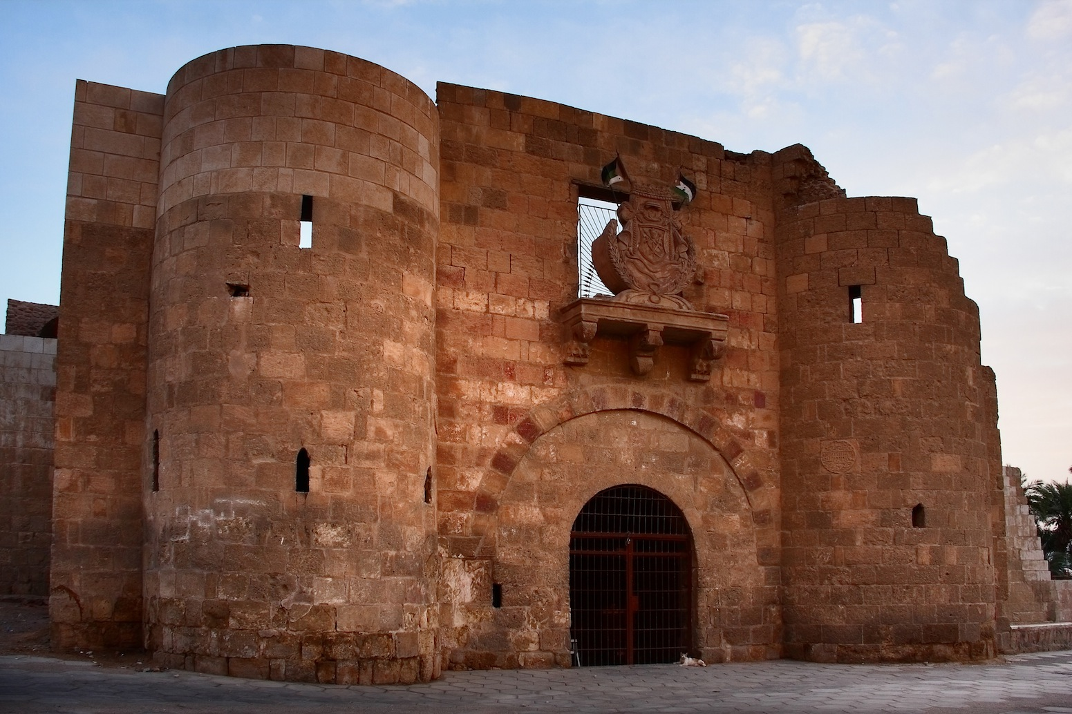 Aqaba Castle